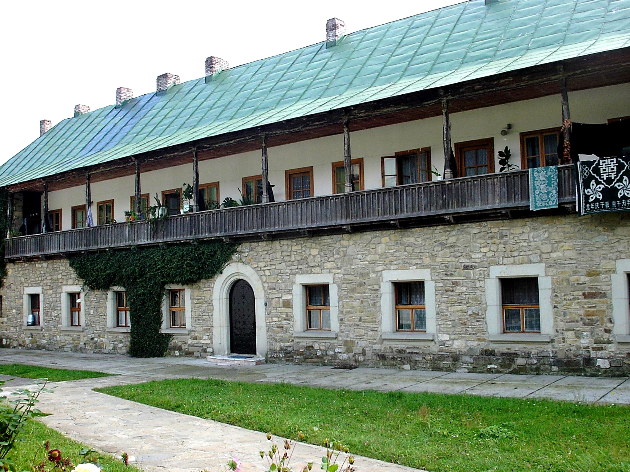 Slatinai kolostor, Románia